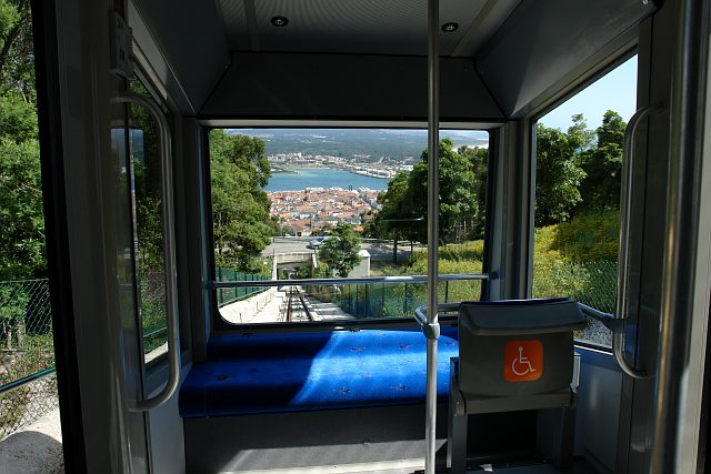 Santa Luzia Elevator in Viana do Castelo, Portugal.